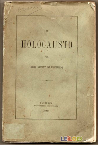 Capa de Holocausto, de Pedro Américo